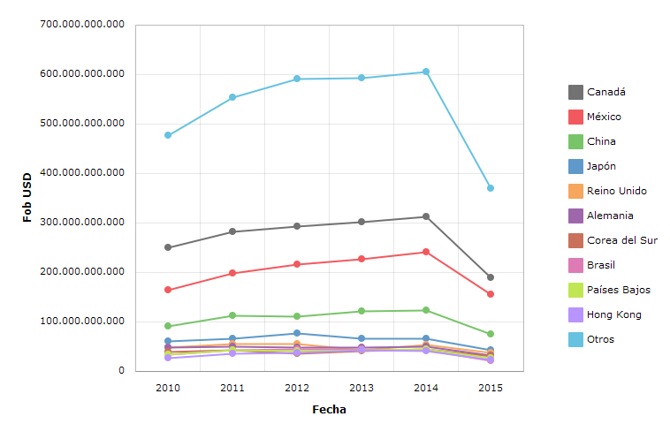 Exportaciones de Estados Unidos del periodo 2010-hasta agosto 2015 expresadas en USD valor FOB.